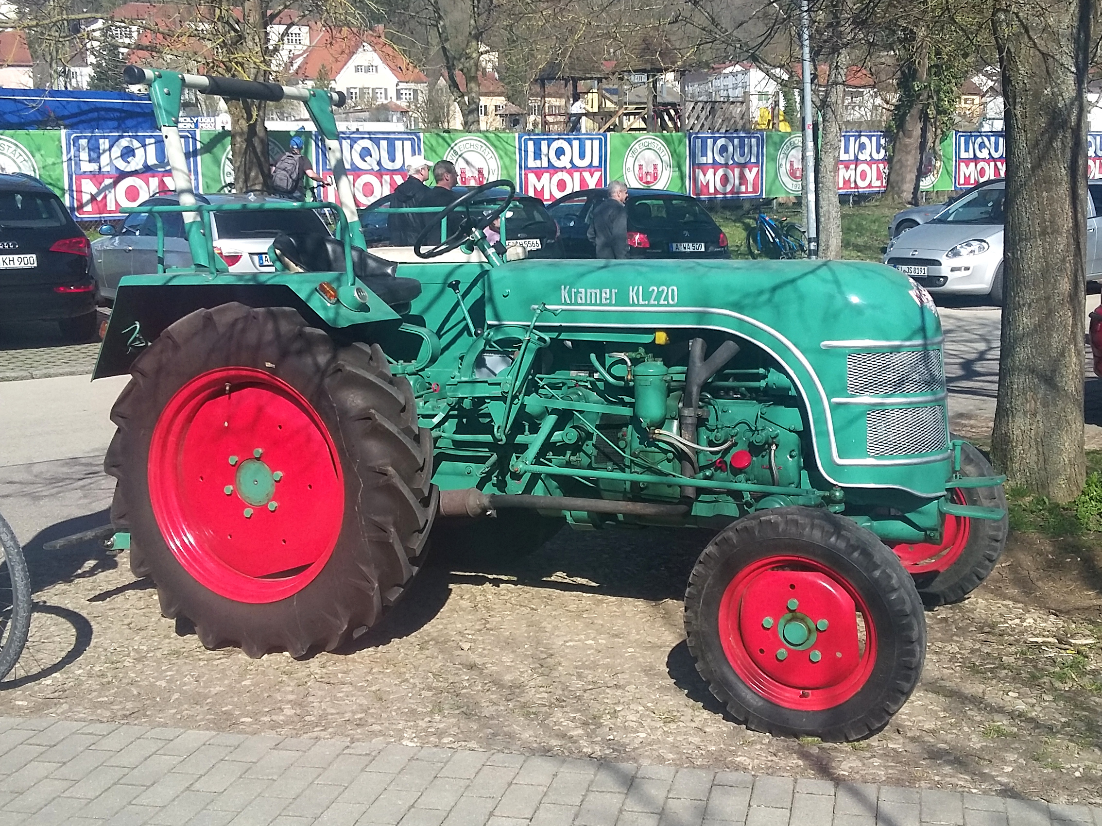 Traktor Modell Kramer KL 220